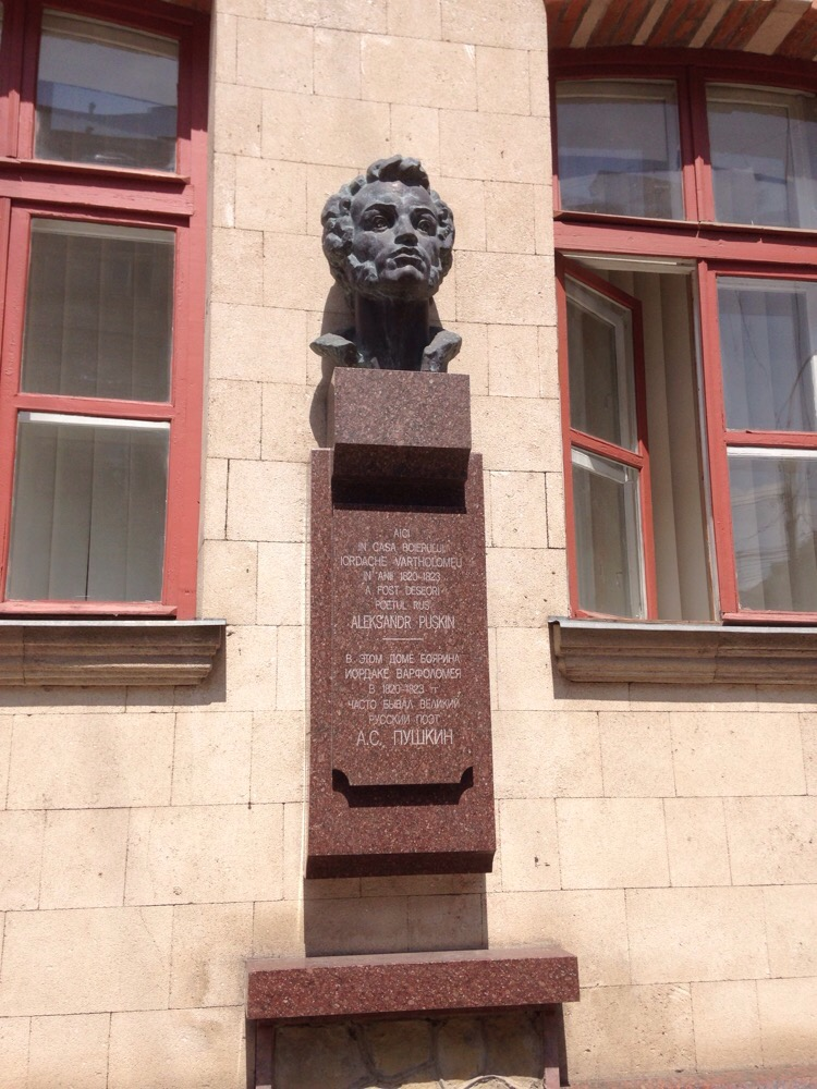 Placa memoriala lui Alexandr Pușkin în Chișinău.